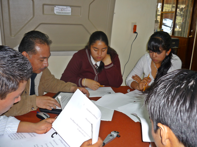 reunión del equipo para poner en común los conceptos y plantear los objetivos e hipótesis para resolver el problema en estudio